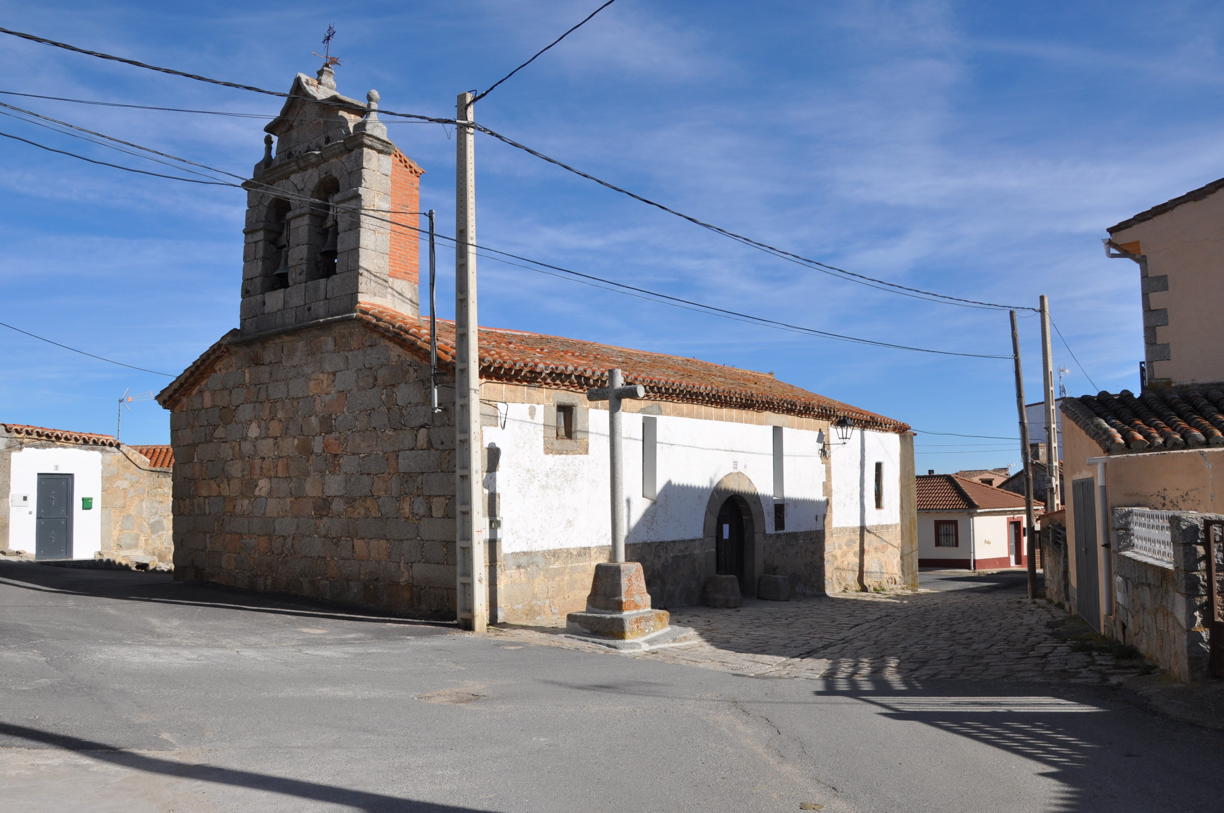 Iglesia parroquial de Nuestra Señora de la Asunción, Martiherrero, Ávila, España